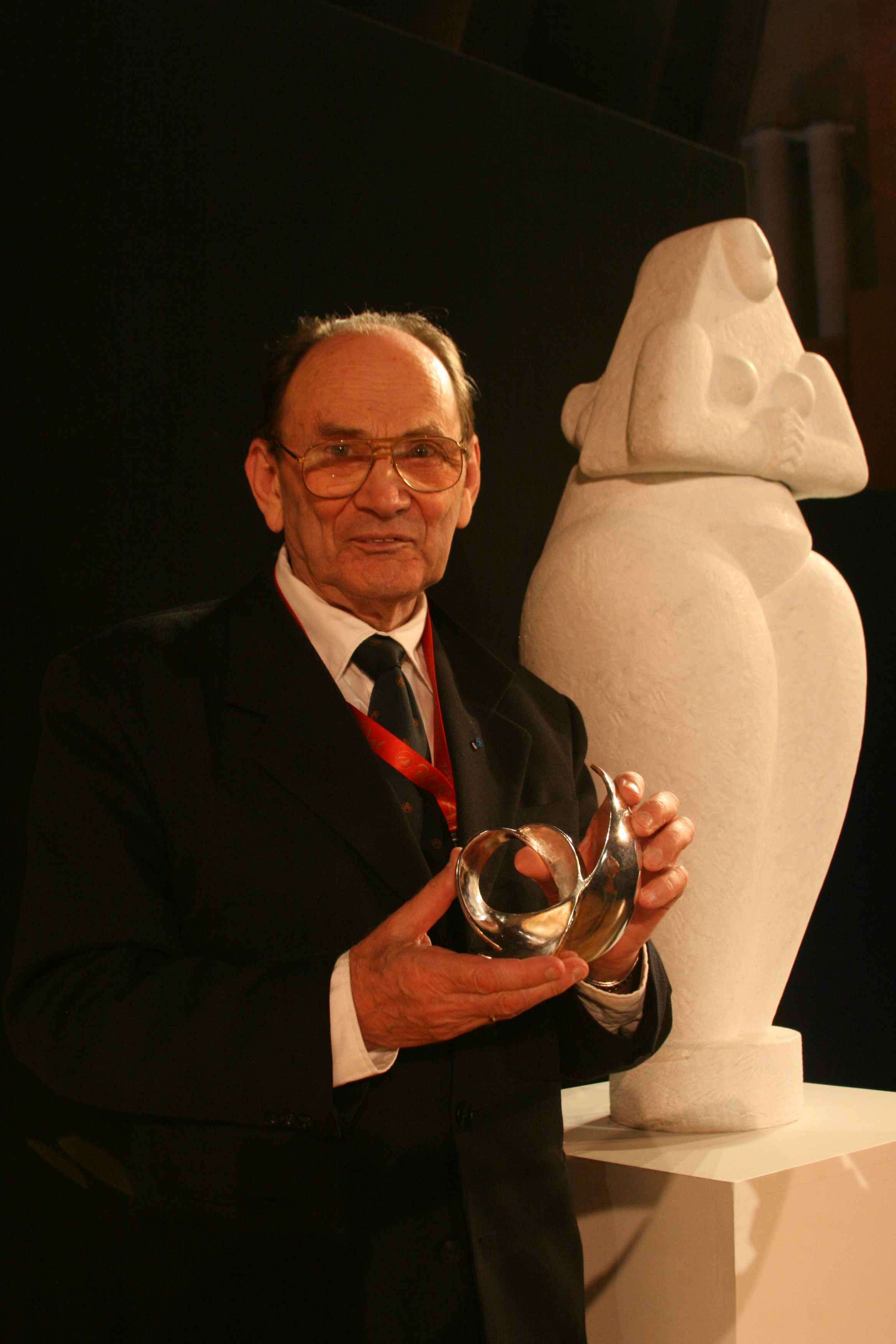 Akadeemik Jaan Einastole anti 13. juulil 2009 UNESCO peakorteris väärikas Marcel Grossmanni auhind. Fotograaf: Peter Murdmaa